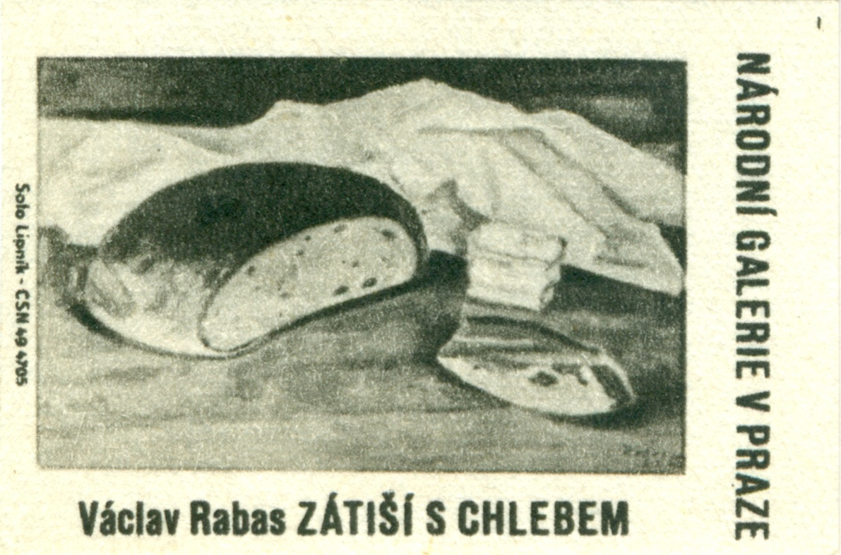 zápalková nálepky r. 1961